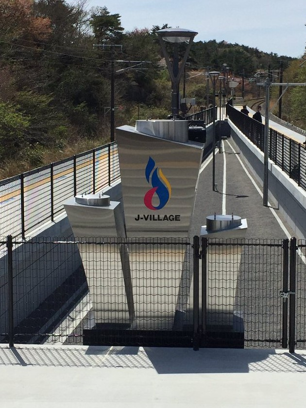 ホーム間に設置された優勝トロフィー台座